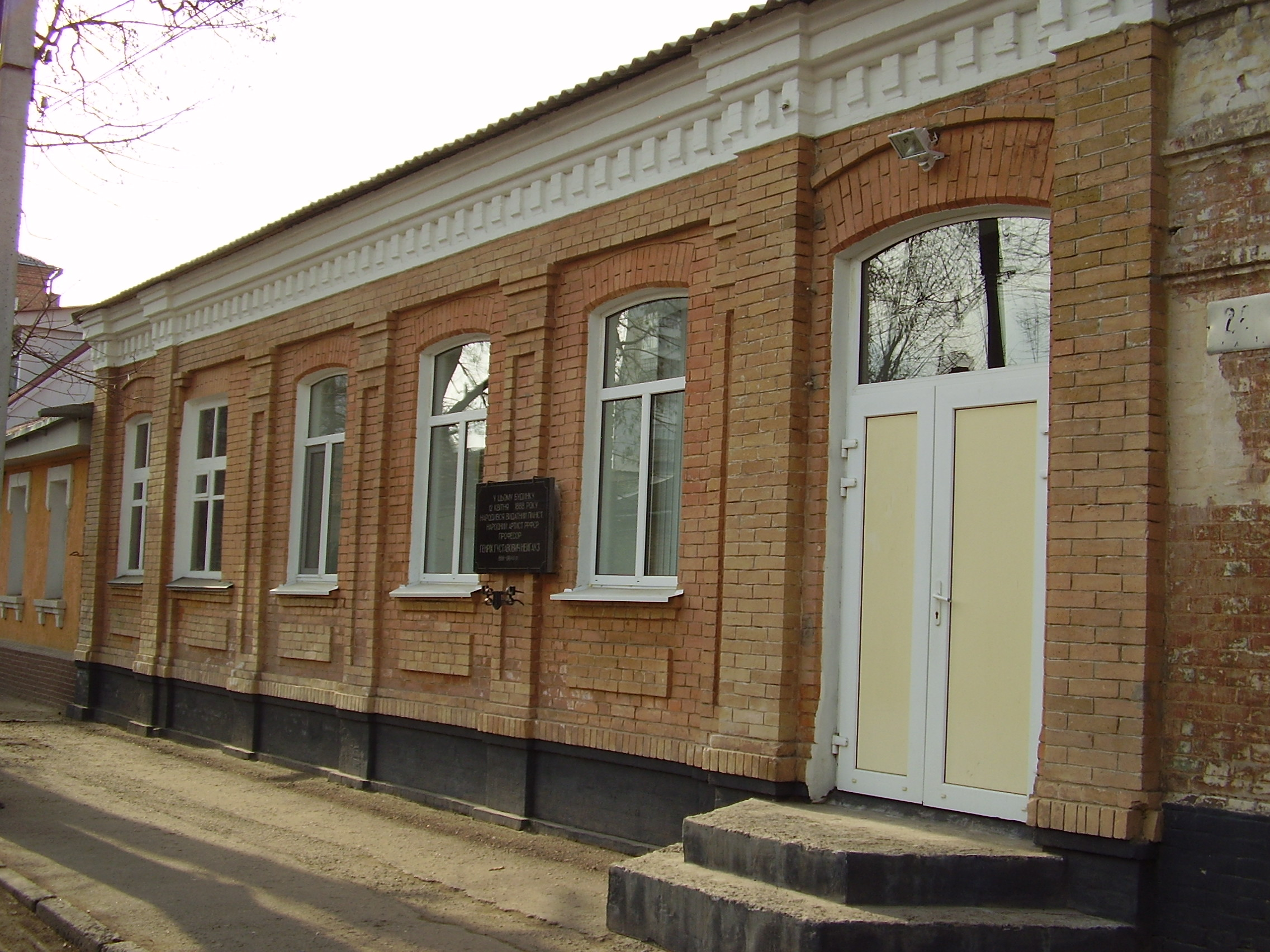 Дом, где родился Генрих Нейгауз. Кировоград.